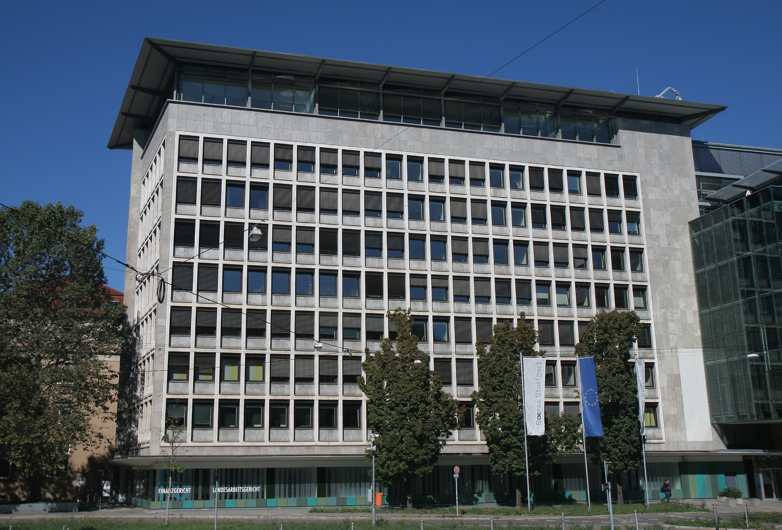 Finanzgericht Baden-Württemberg und Landesarbeitsgericht Baden-Württemberg in Stuttgart, Börsenstraße 6 (ehemals Schlossstr. 22).